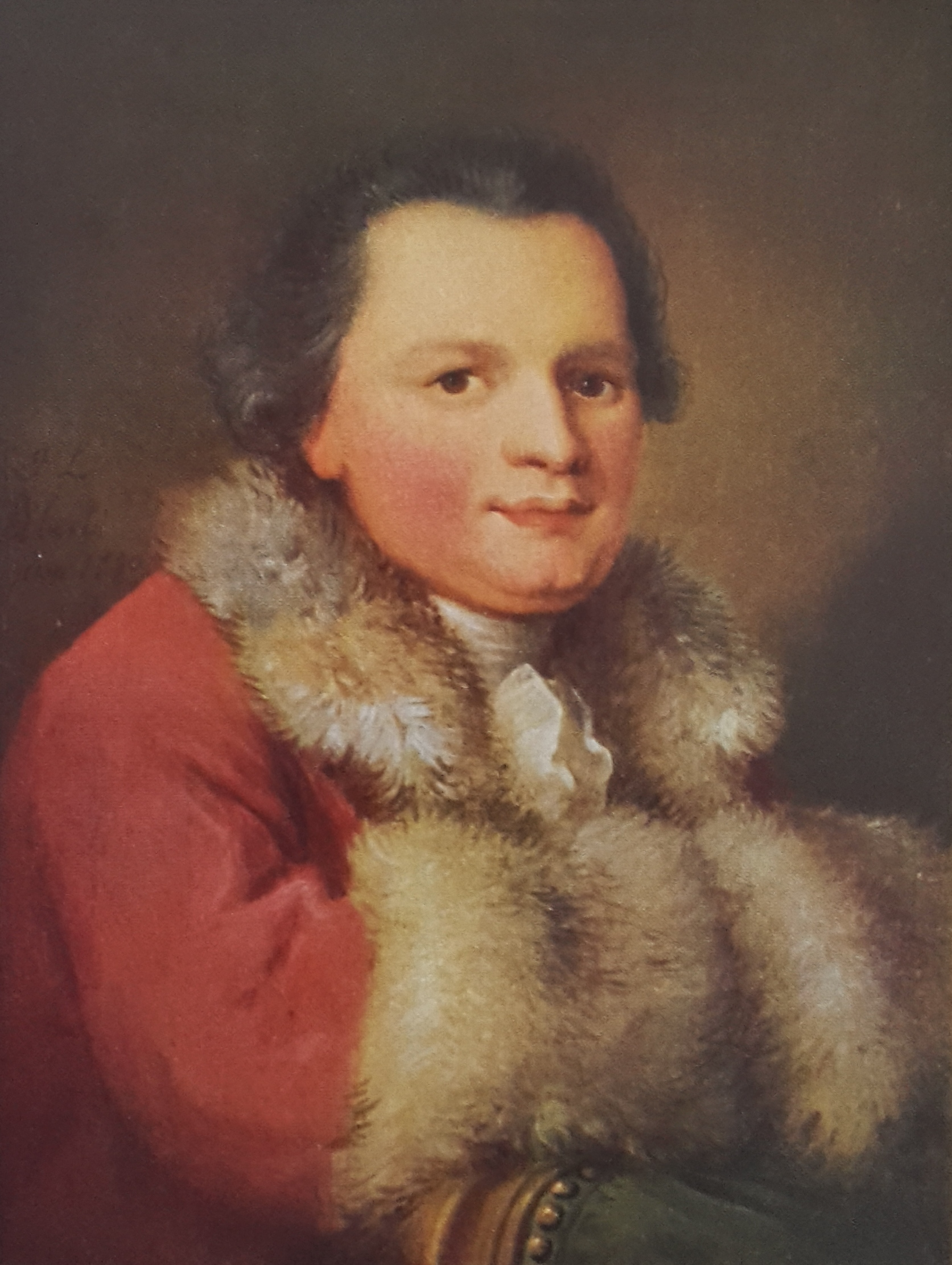 Bildnis Beat Ludwig Walthard, Verleger.